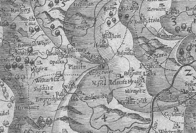 Výřez oblasti Klatovska na mapě Kristiána Vettera, která byla publikována v Balbínově knize Miscellania.